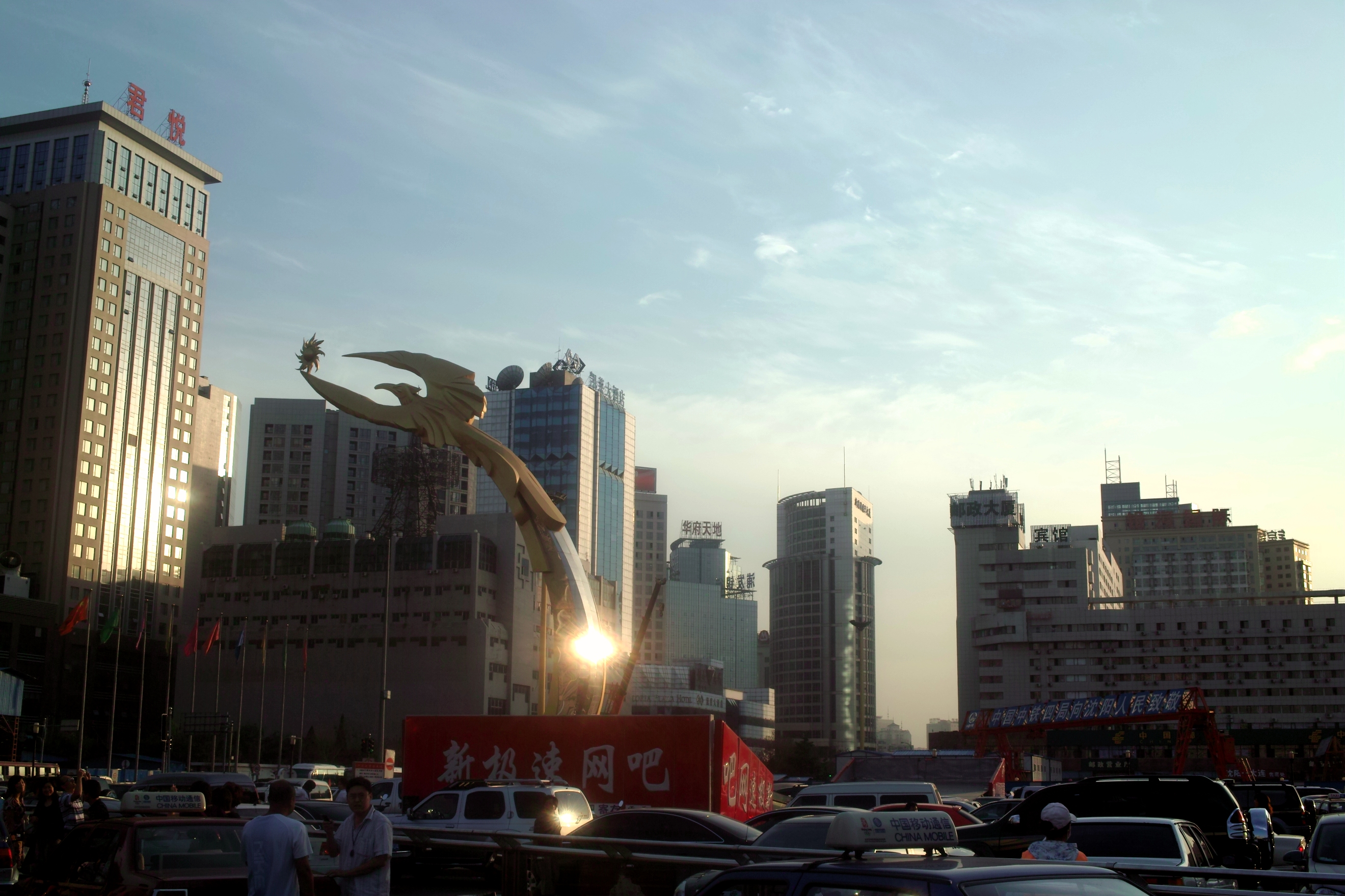 沈阳北站 太阳鸟雕塑